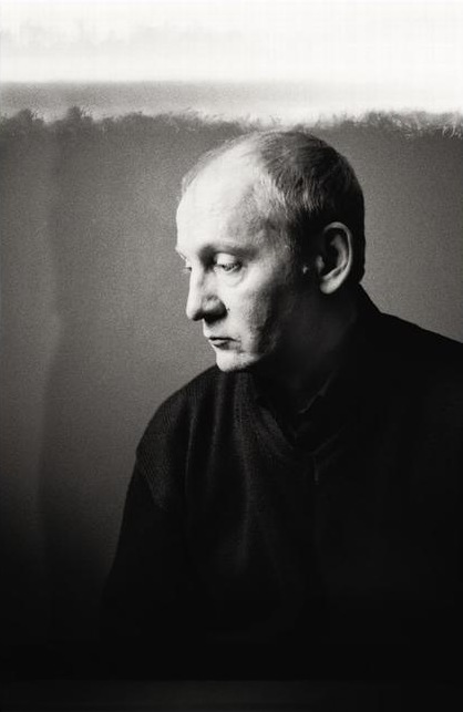 Виктор Вержбицкий. Алексей Никишин.2008